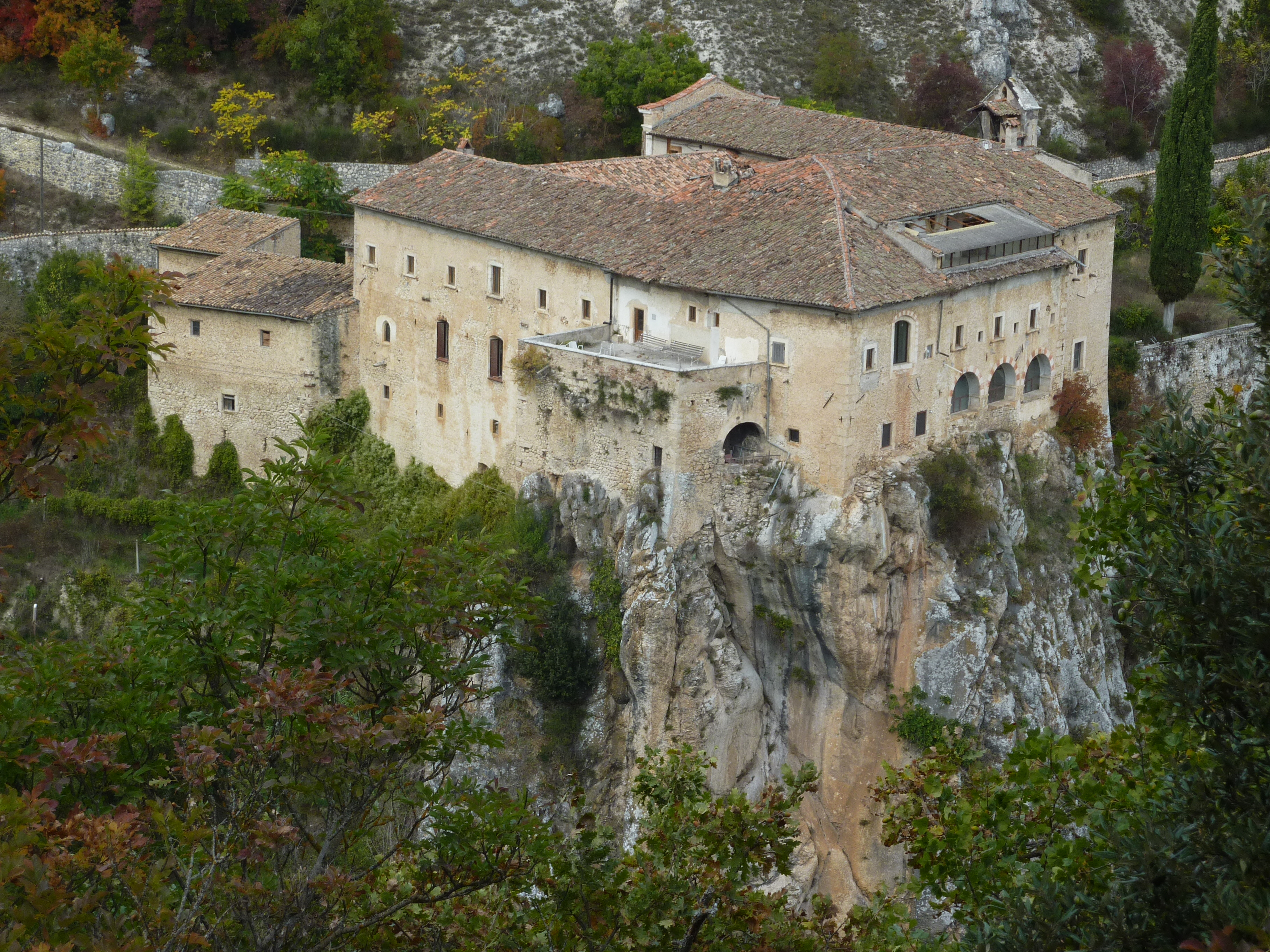 Ocre (AQ): Convento di Sant'Angelo